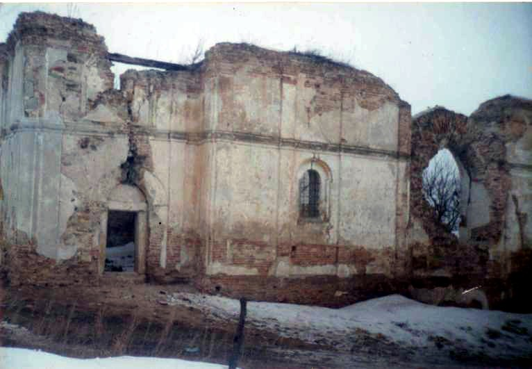 l`église_Manzati